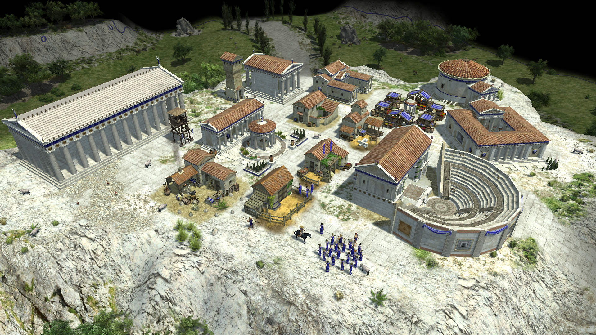 0 A.D. Athener